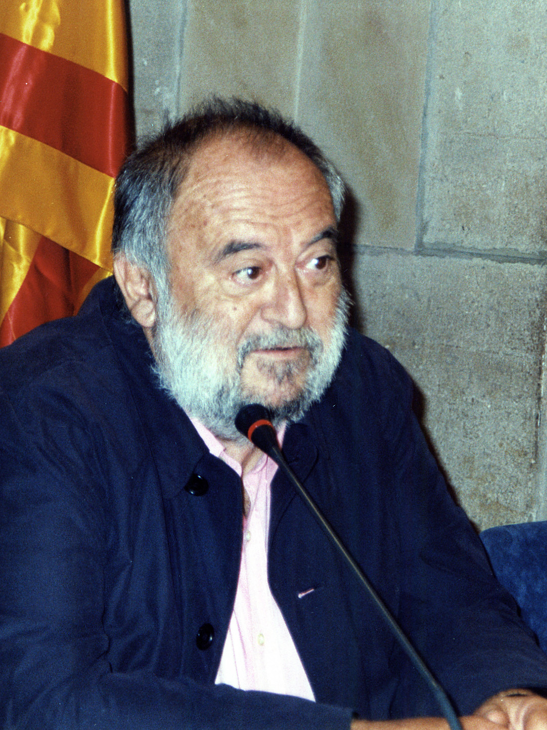 Joaquim Jordà i Català en un acte de la Filmoteca de Catalunya el 2001